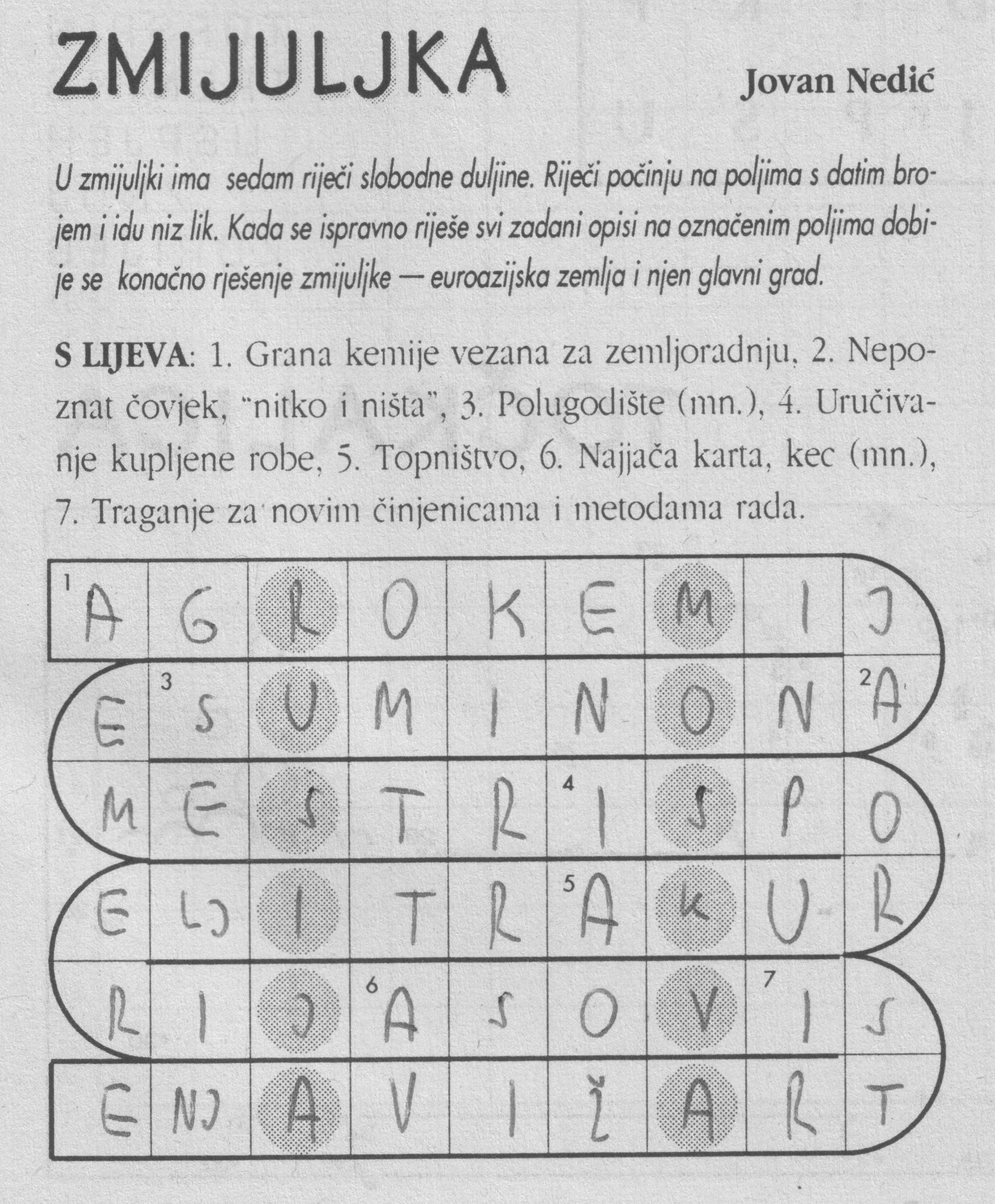 Zmijuljka Jovana Nedića iz "Osmosmjerke" broj 226, str. 27